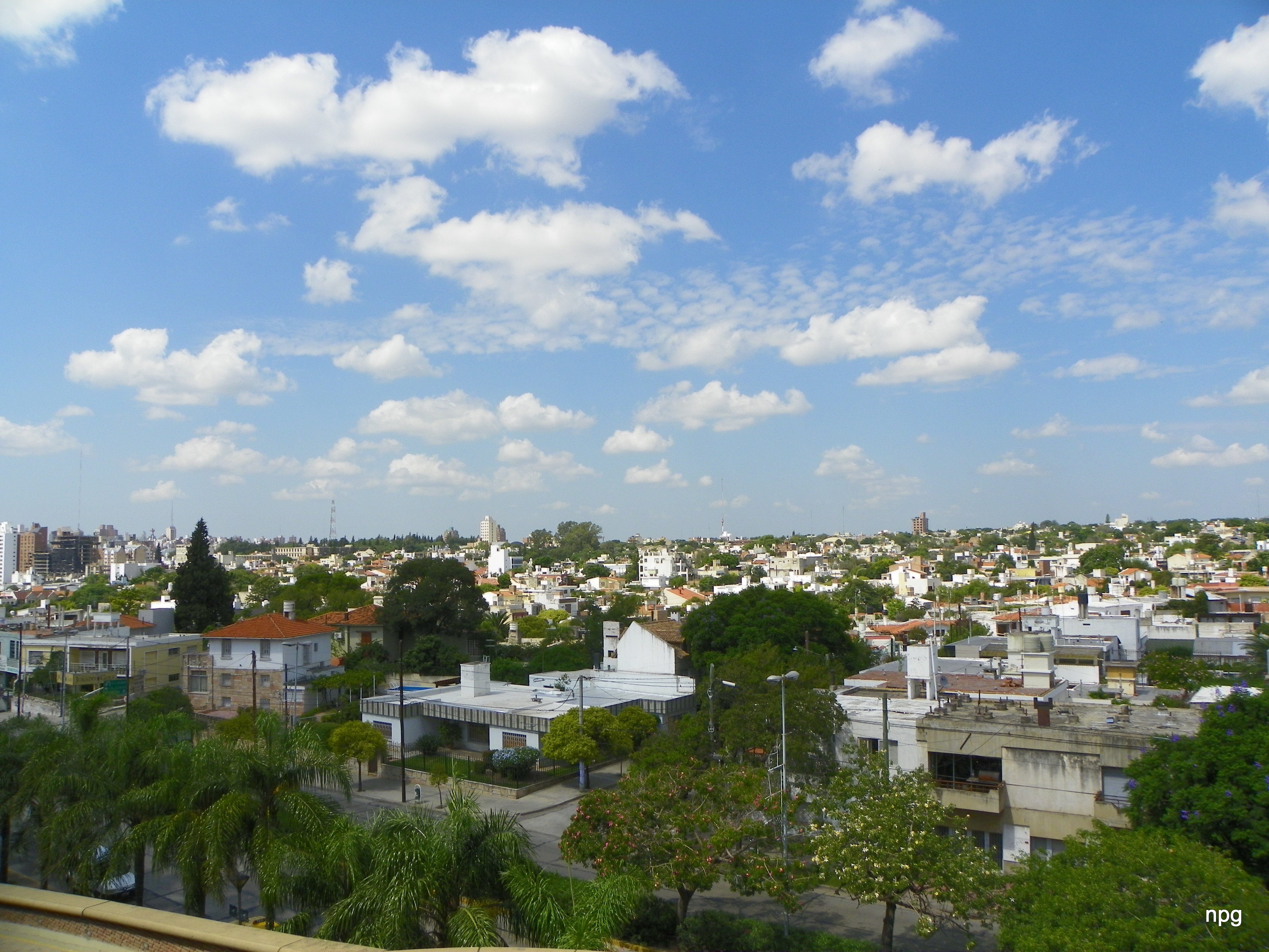 Córdoba, Argentina